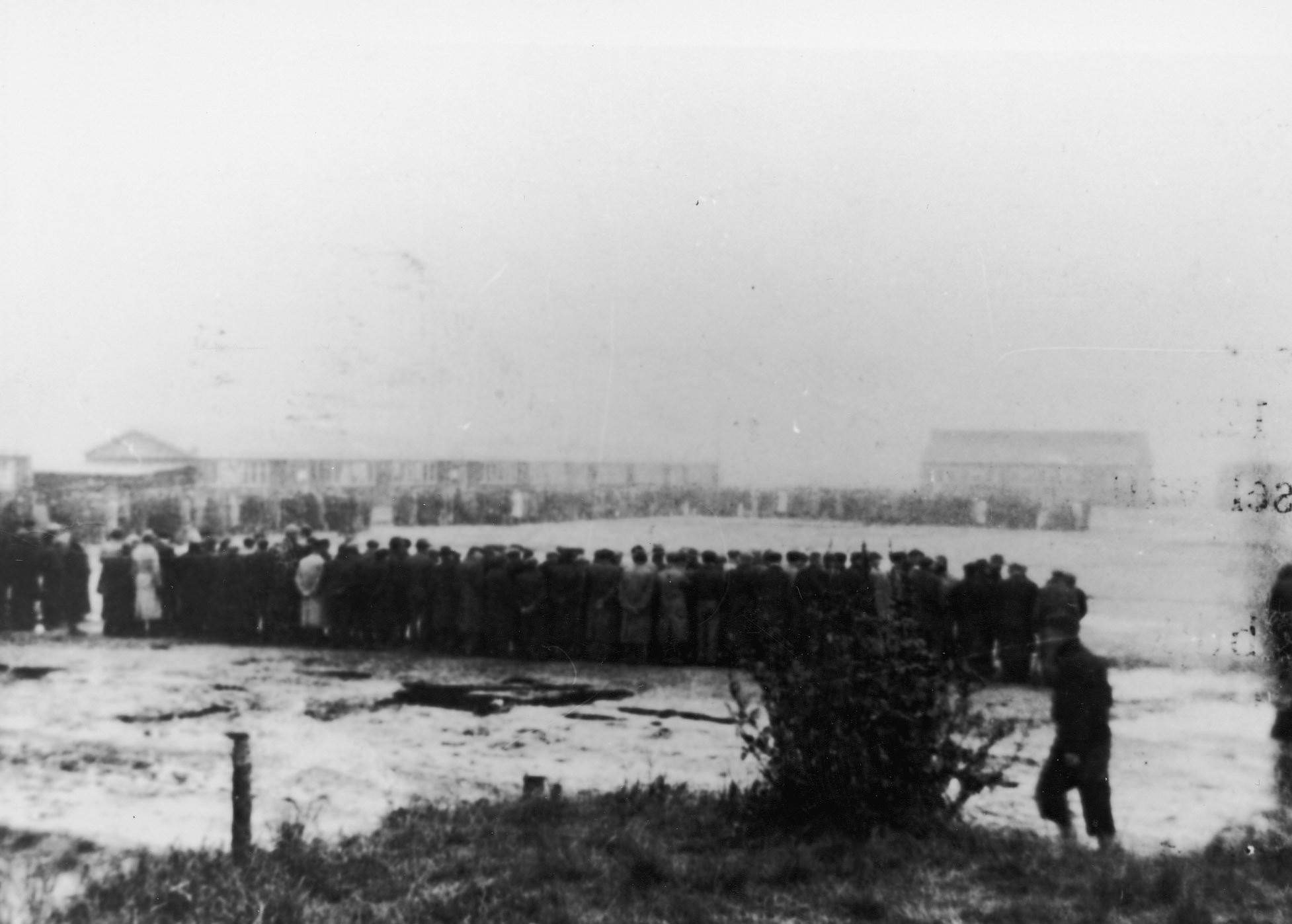 Op appel in kamp westerbork